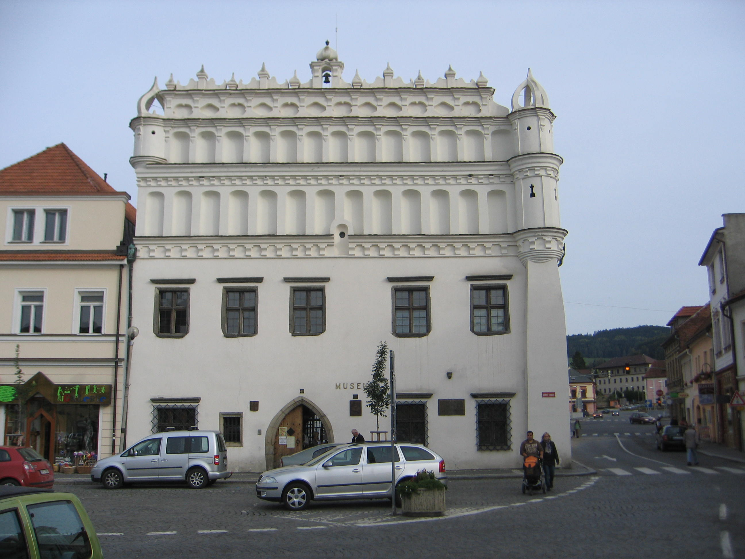 Děkanství - muzeum (Sušice), nám. Svobody 40, Sušice